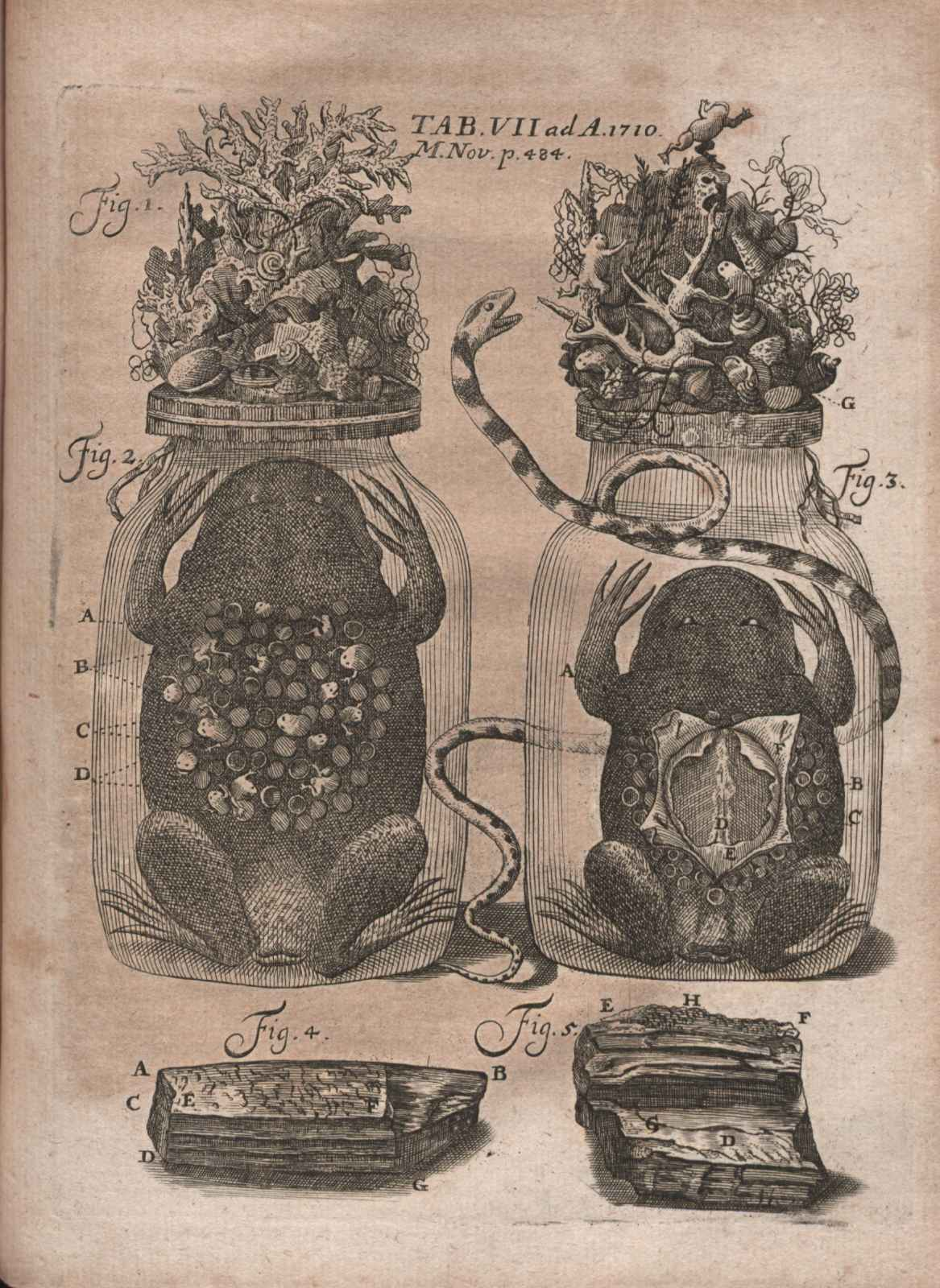 Illustration